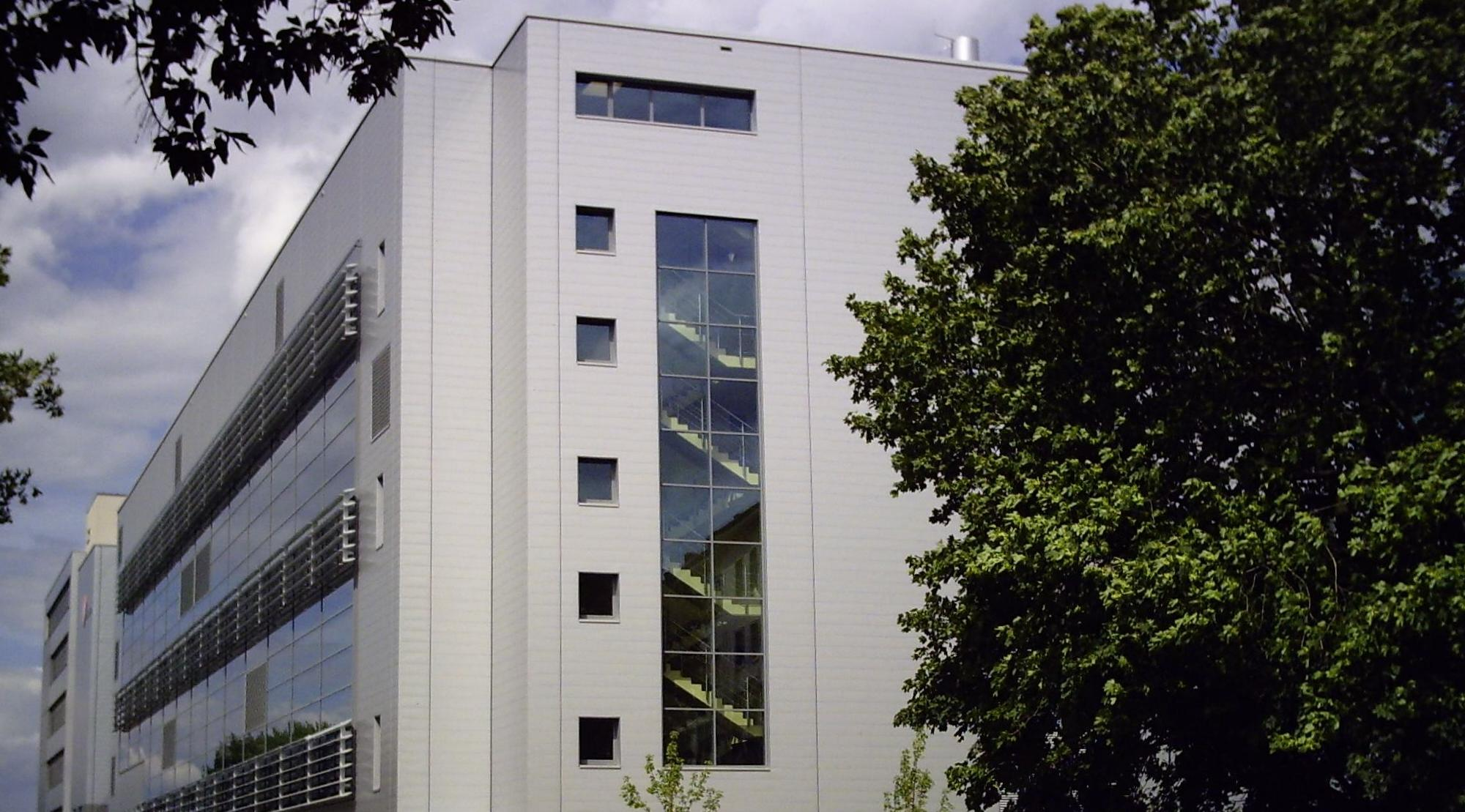 Fassadenansicht des Sächsischen Serumwerks Dresden von Süd-West.